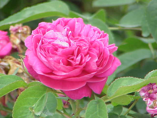 Species: Rosa damascena Family: Rosaceae Cultivar: Rose de Resht Image No. 6